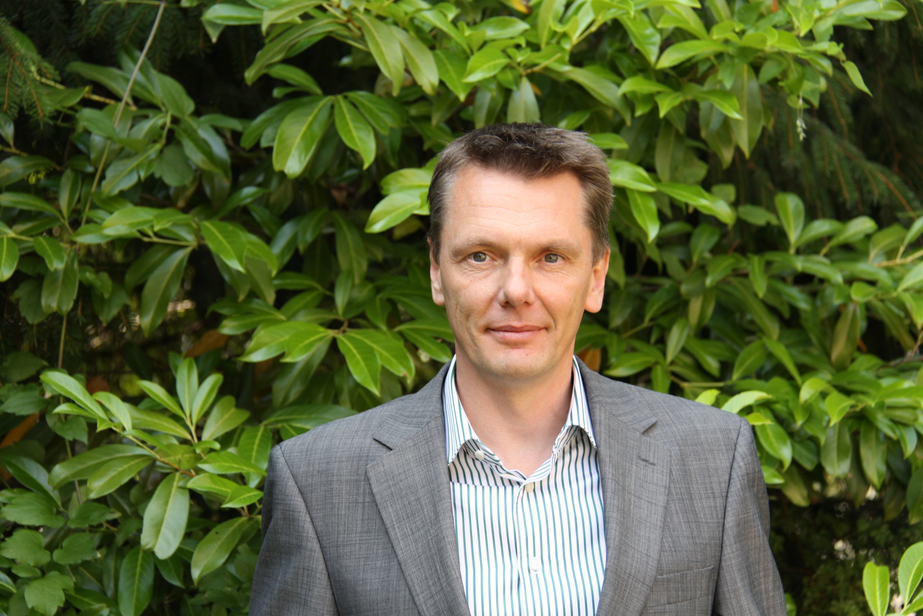 Michael Jungclaus (MdL), Fraktion BÜNDNIS 90/DIE GRÜNEN im Brandenburger Landtag